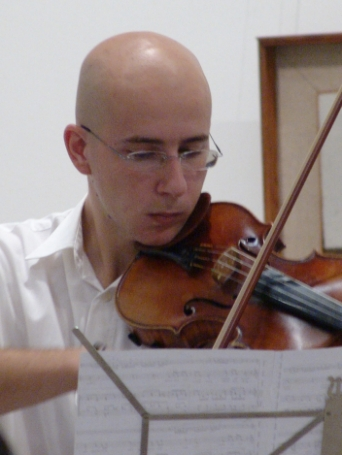 Kiril Naumov, violinist